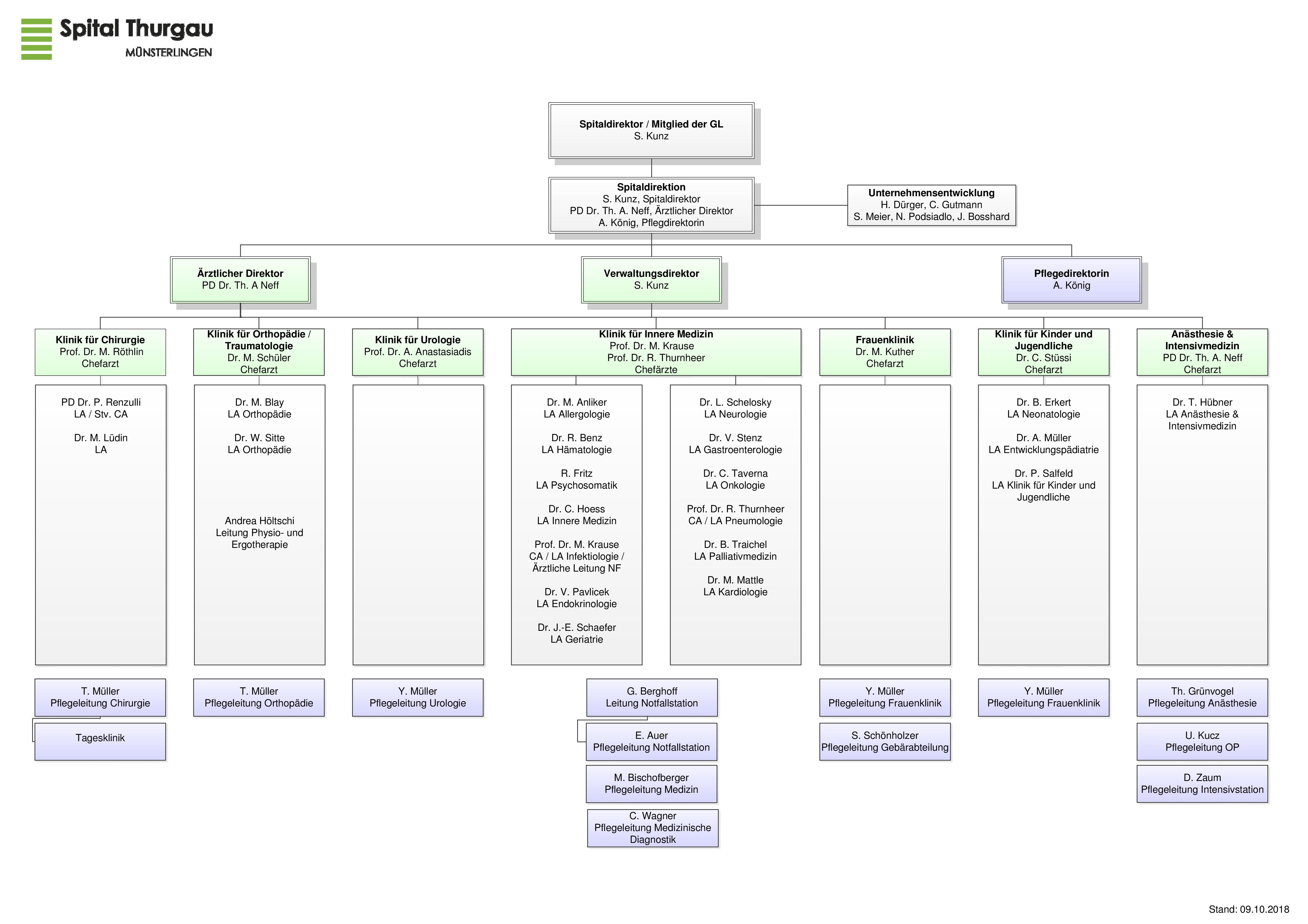 Detailiertes Organigramm des Kantonsspital Münsterlingen